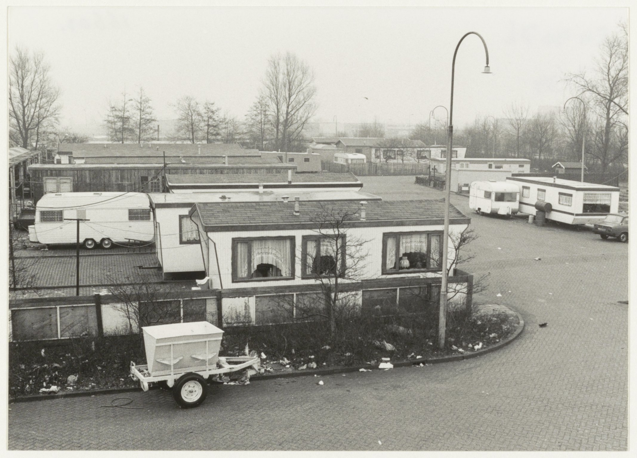 CollectieCollectie Fotoburo de BoerInventarisnummerNL-HlmNHA_54016603NL-HlmNHA_1478_24907KBeschrijvingWoonwagenkamp Waarderveld.FotonummerNL-HlmNHA_1478_4327DocumenttypeTopografische prenten, tekeningen en foto'sVervaardigerBoer, Poppe de Soort vervaardigerFotograaf AnnotatiesHD.220285LandNederland ProvincieNoord-Holland GemeenteHaarlem PlaatsHaarlem StraatWaarderveldweg GeografischWaarderpolder Begindatum22-02-1985Einddatum22-02-1985TechniekFoto TrefwoordenWoonwagenkampen